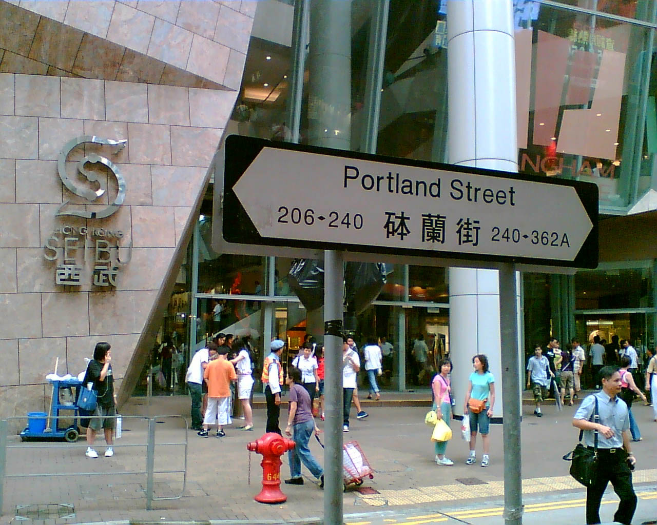 位於旺角砵蘭街的朗豪坊西武